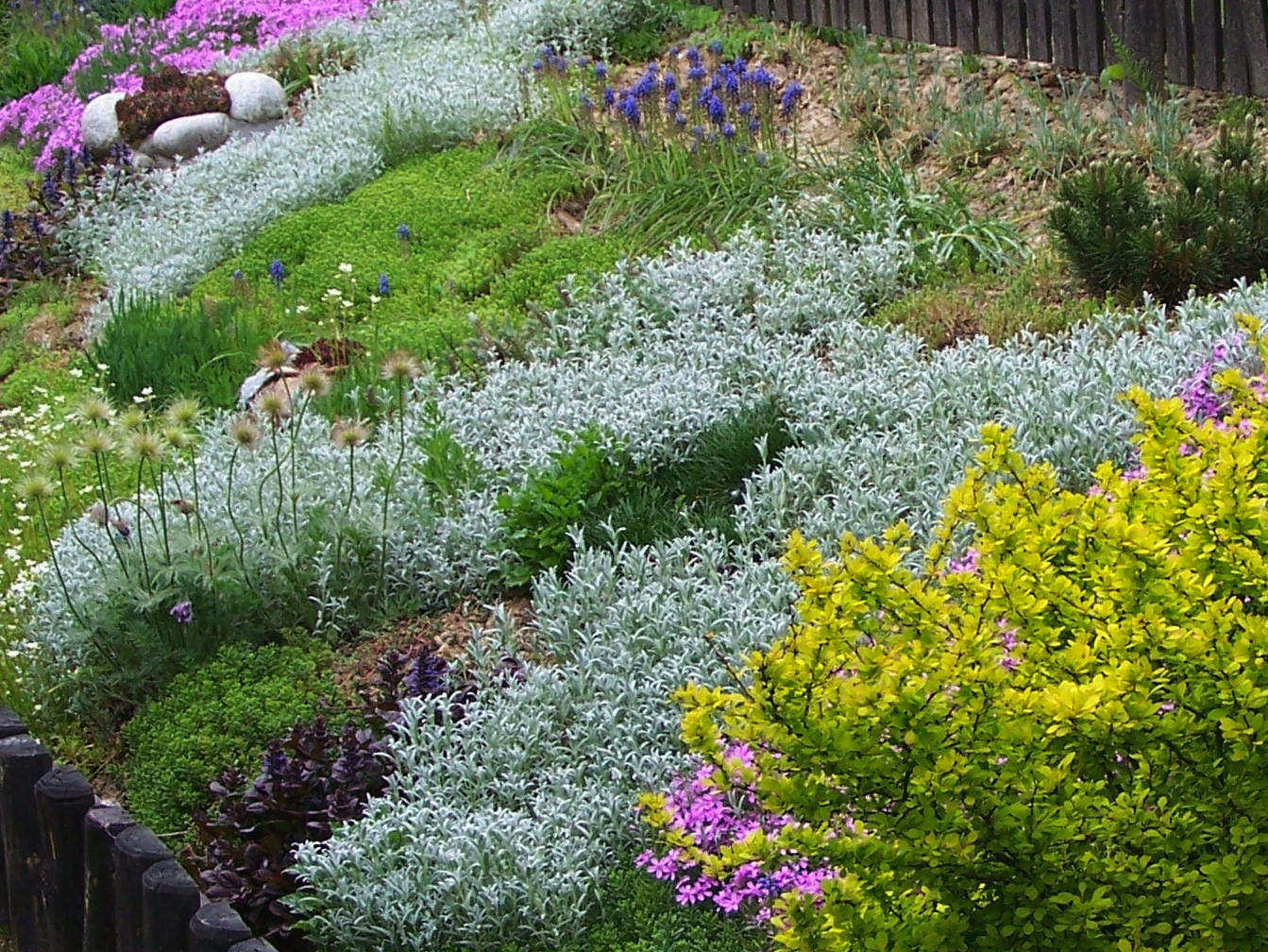 Cerastium tomentosum, Berberis thunbergii, Ajuga reptans, Phlox subulata, Muscari armeniaca, Pulsatilla vulgaris